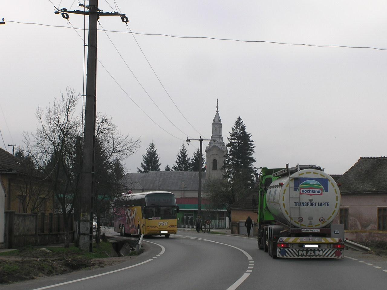 Lipova im Kreis Arad, Rumänien